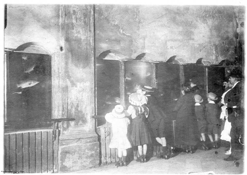 Napoli - Stazione Zoologica. Visitatori davanti alle vetrine nell'Aquarium. Foto di autore sconosciuto.